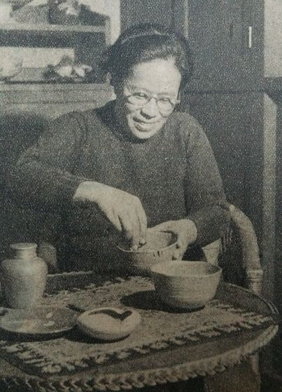 藤田たき